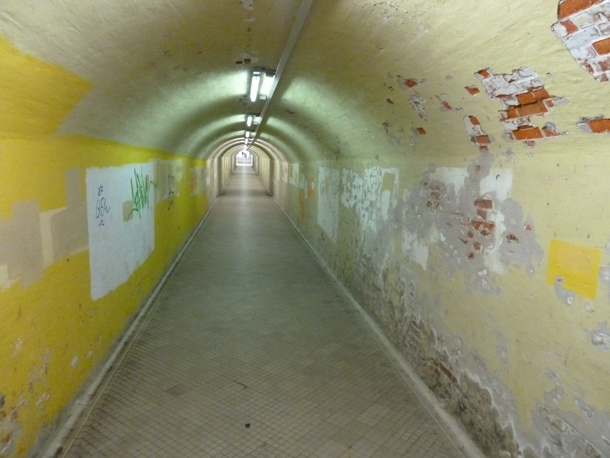 Bahnhof Cottbus, westlicher Tunnel ("Spreewaldtunnel")